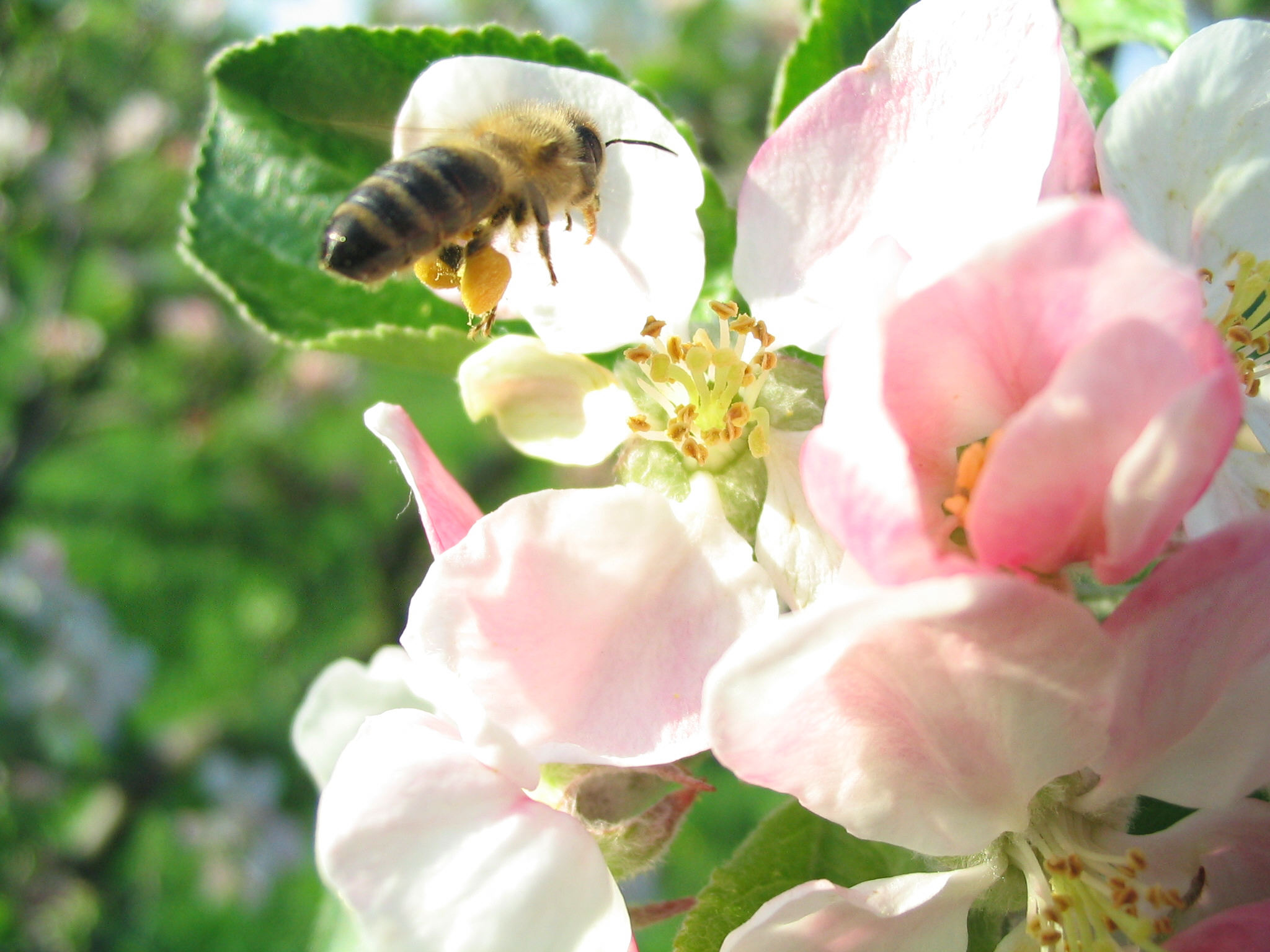 Biene beim Nektar sammeln, Pollen an Hinterbeinen, Fotografiert in Deutschland, Thüringen